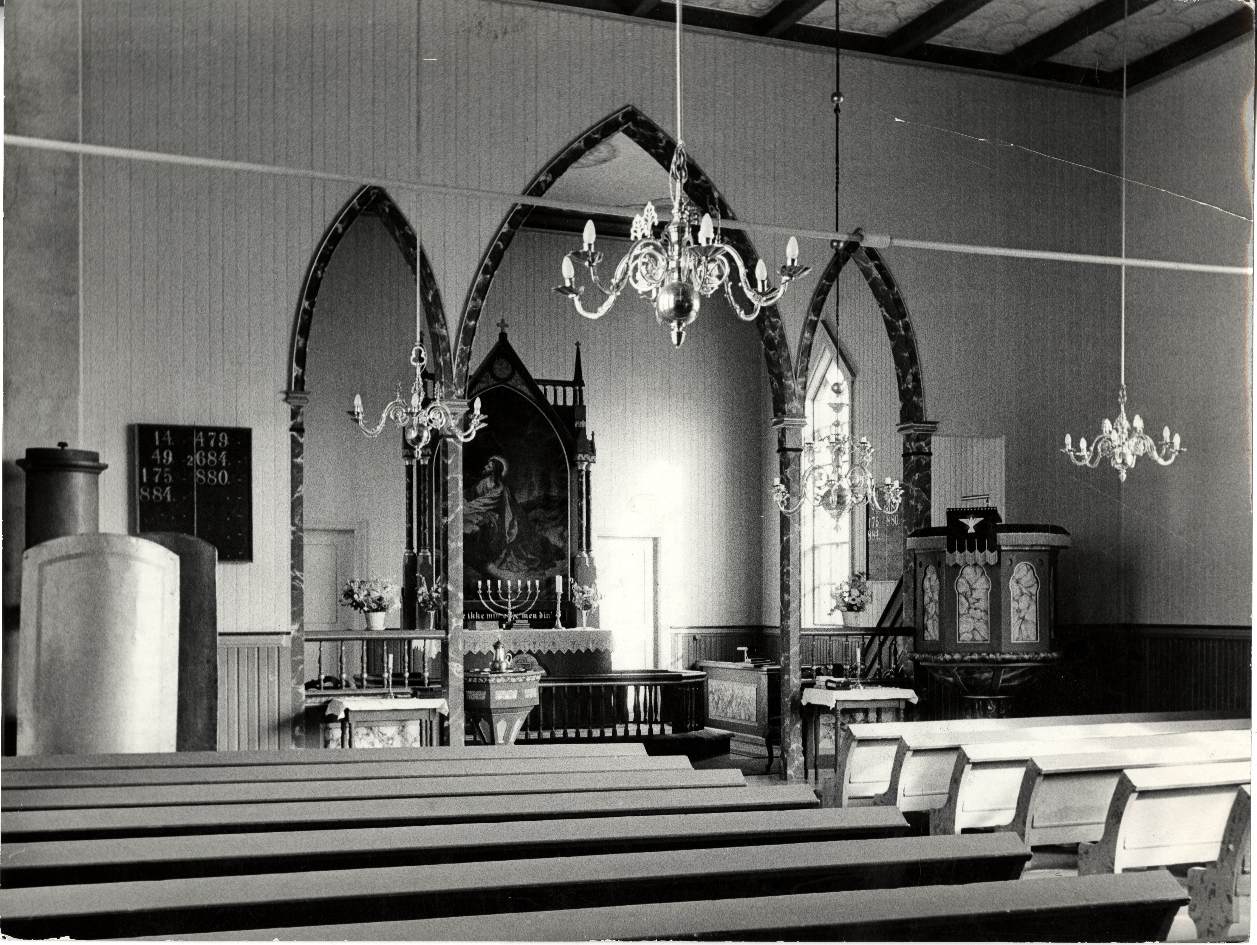 Værnes (Agdenes) church, Norway